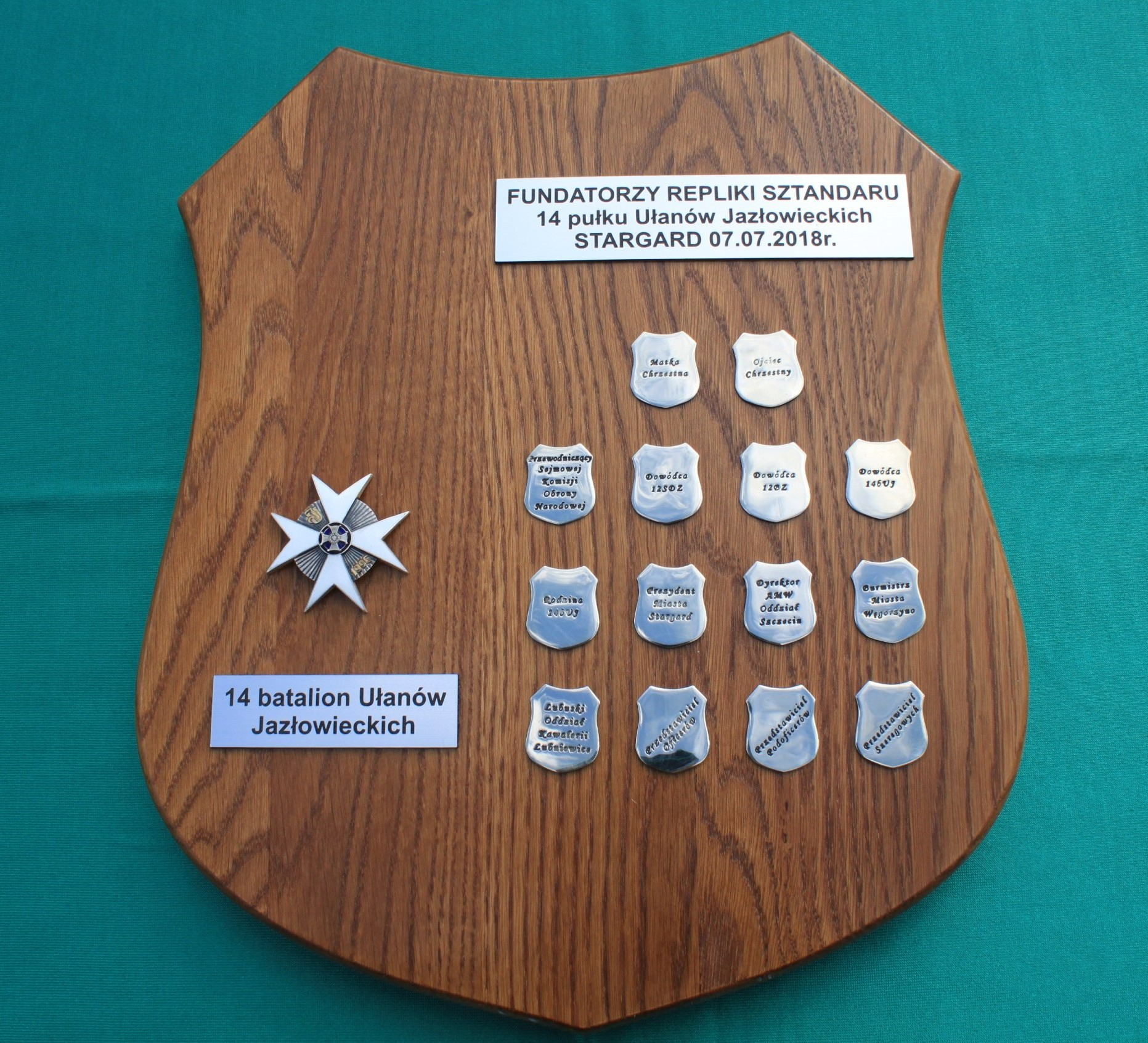 Fundatorzy Repliki Sztandaru (2018)